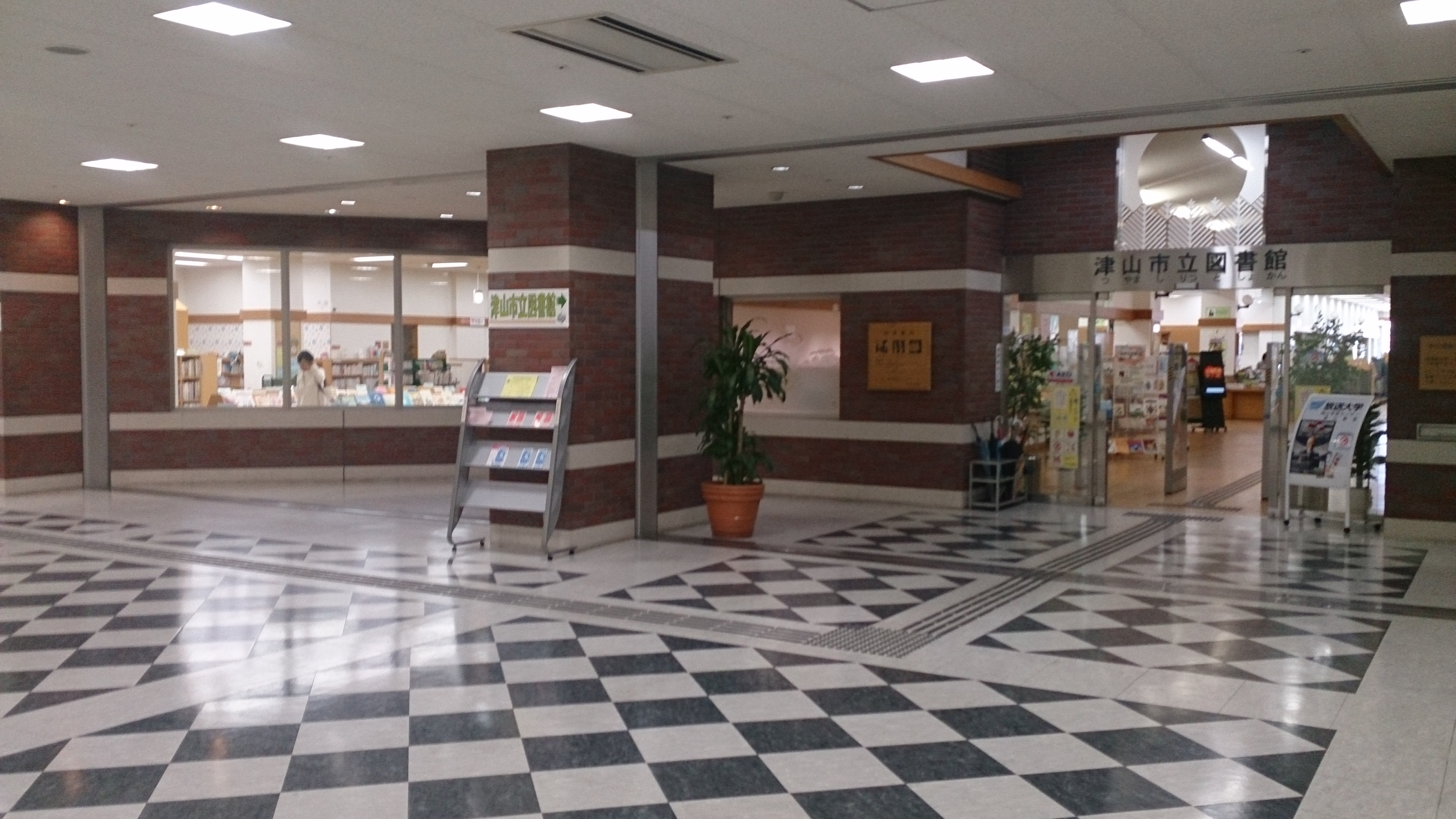 津山市立図書館のアルネ本館の入り口です。